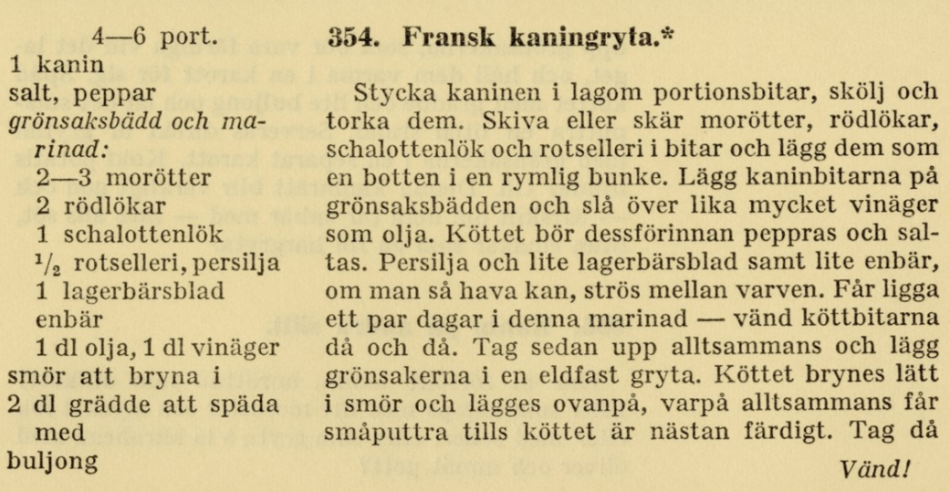 Stockholms stadsarkiv SE/SSA/2143 Philipsenska skolinrättningen Ö1 volym 9